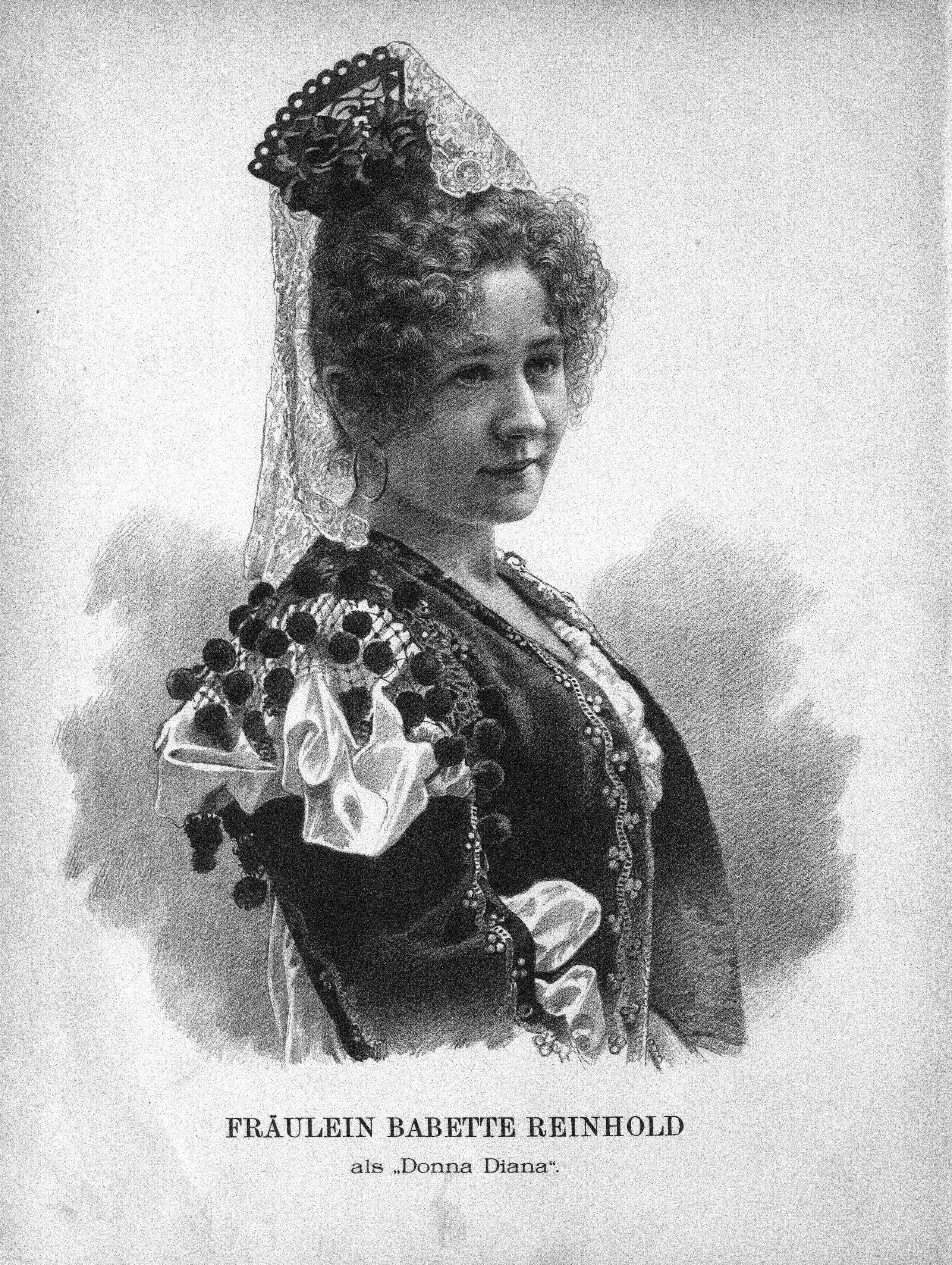 Babette Reinhold (1863–1940) in der Titelrolle der gleichnamigen komischen Oper Donna Diana von Emil Nikolaus von Reznicek; UA Prag, 16 December 1894